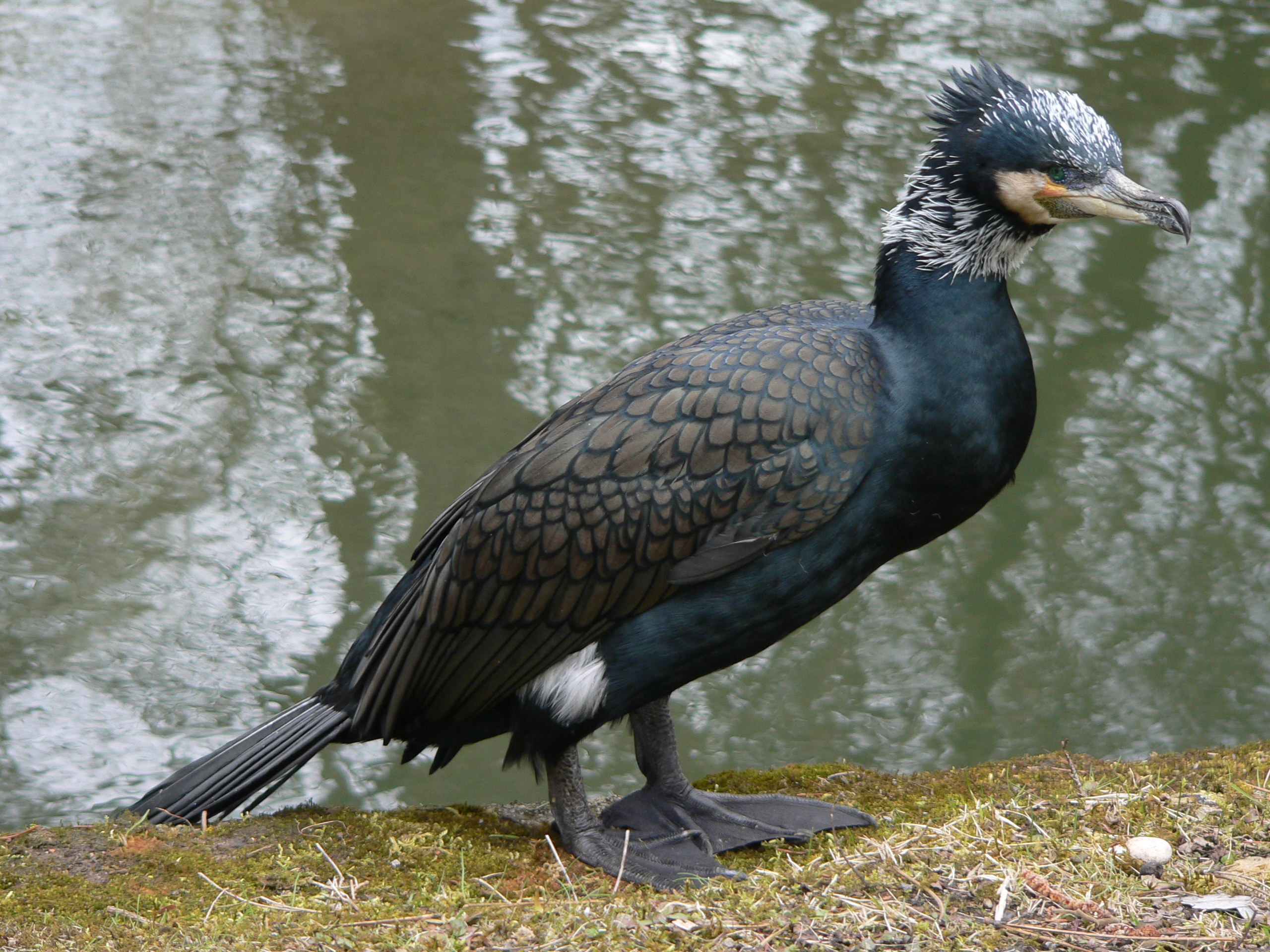 Kormoran